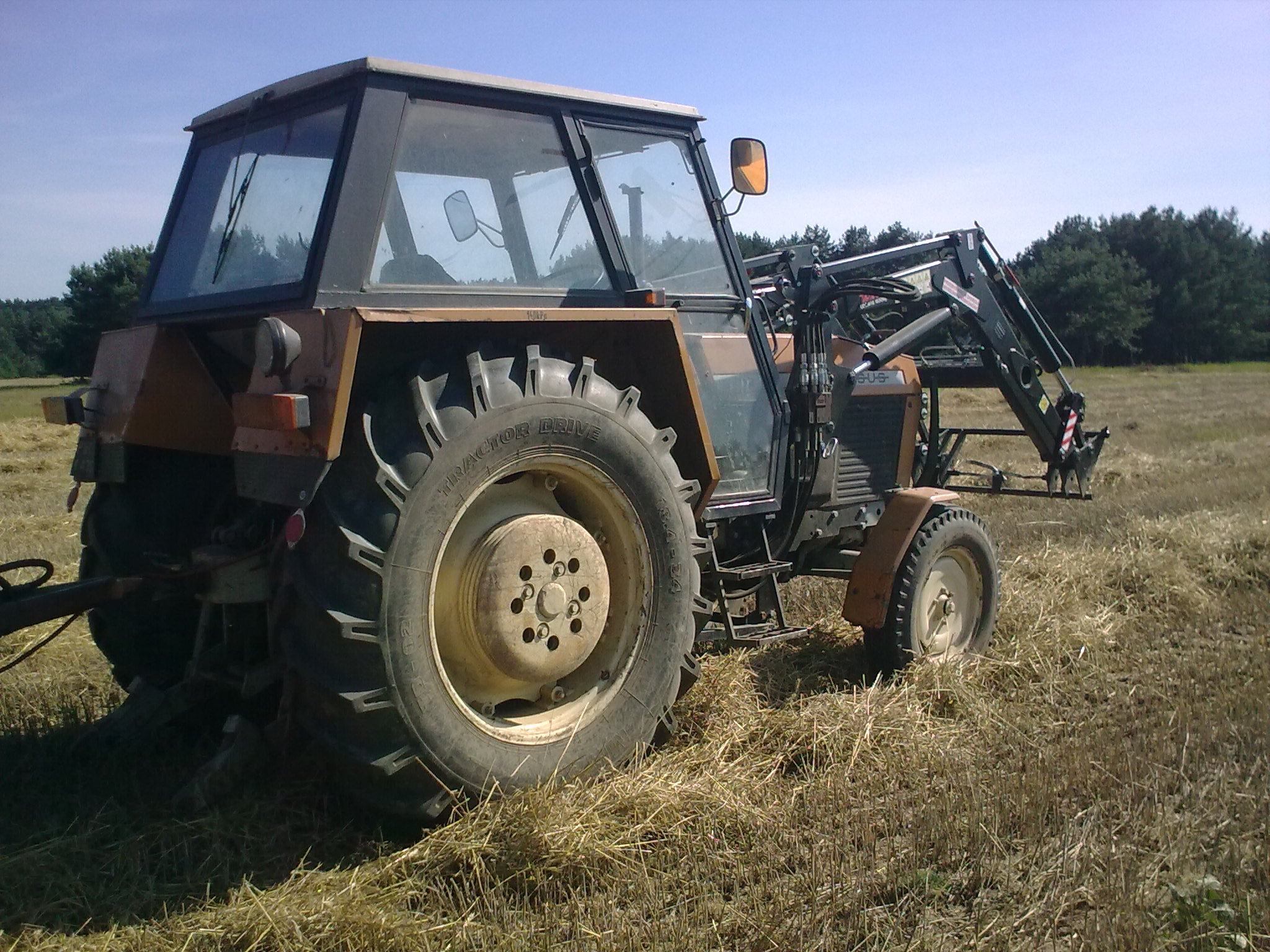 Ursus 912 widok w boku